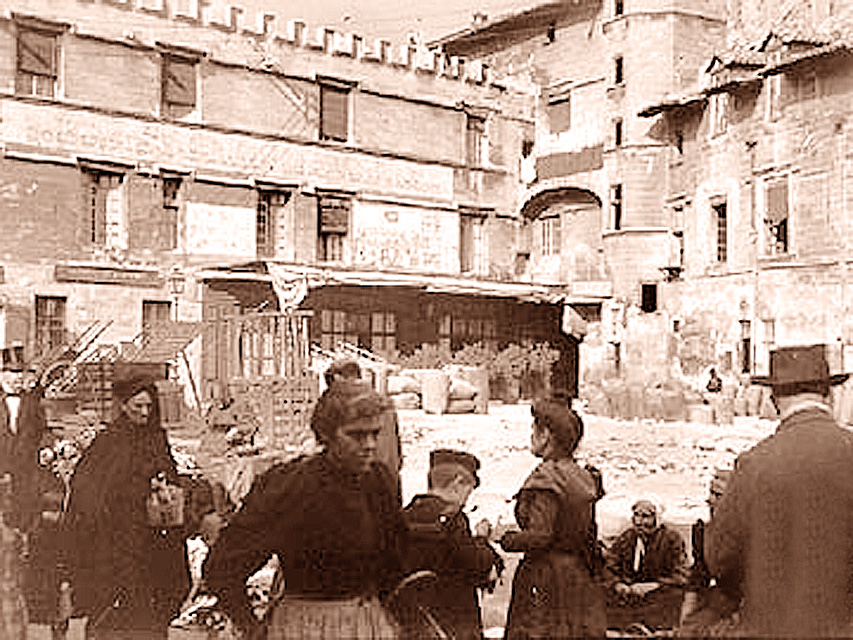 Carte postale montrant la rue Saint-Jean le Vieux et le marché de la place Pie éditée avant 1898